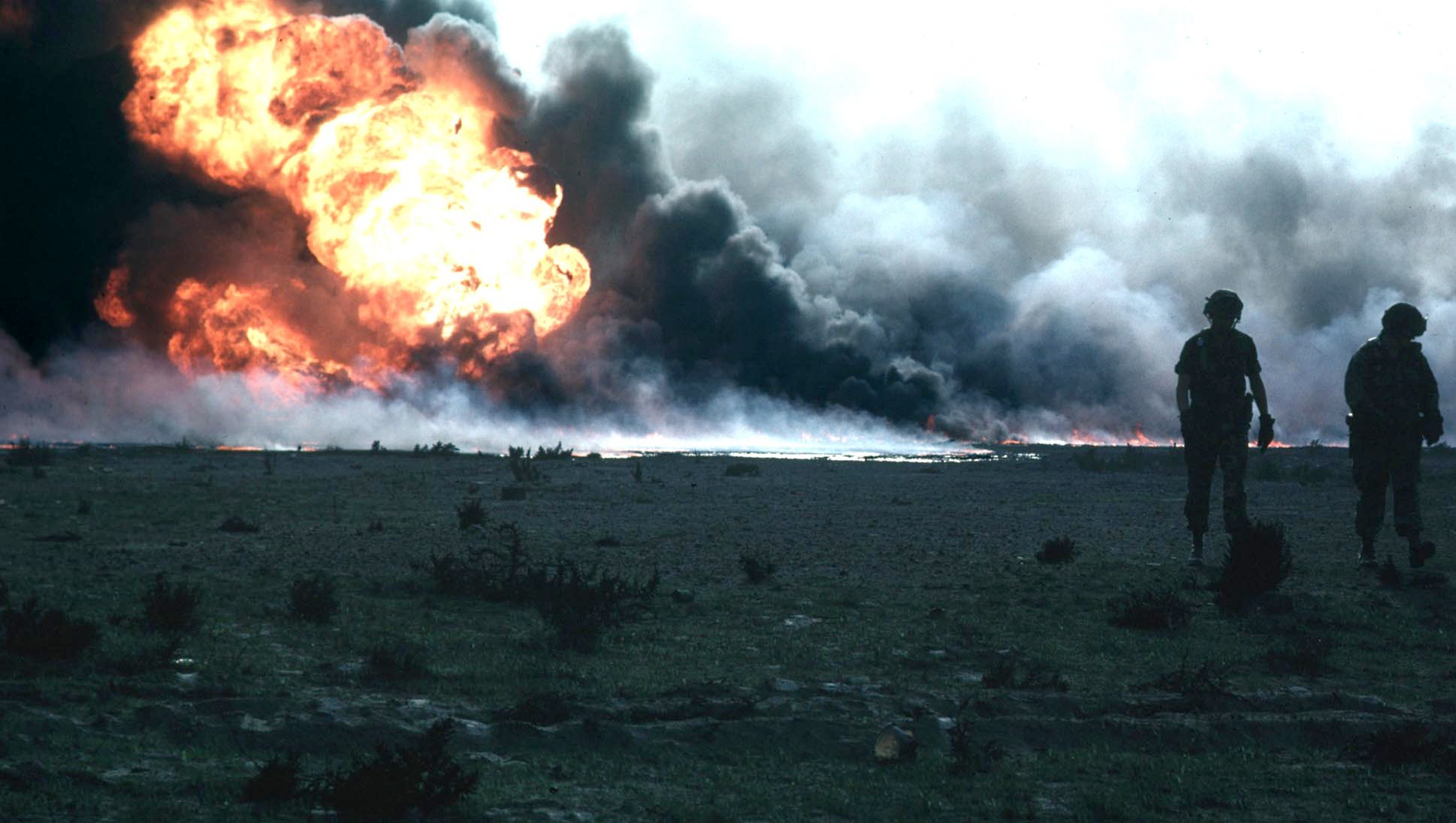 Burning oilfield during Operation Desert Storm, Kuwait